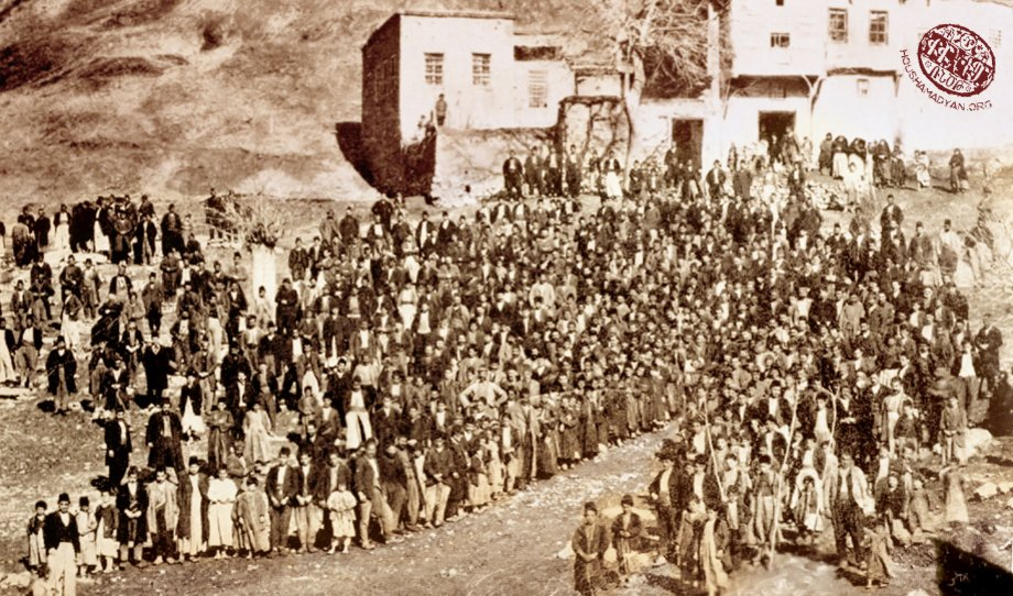 Hüseynik mahallesinde Ermeniler, Elazığ